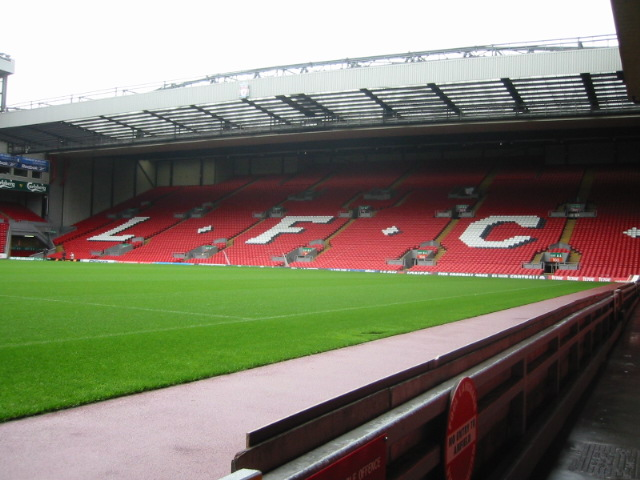 Picture%20017